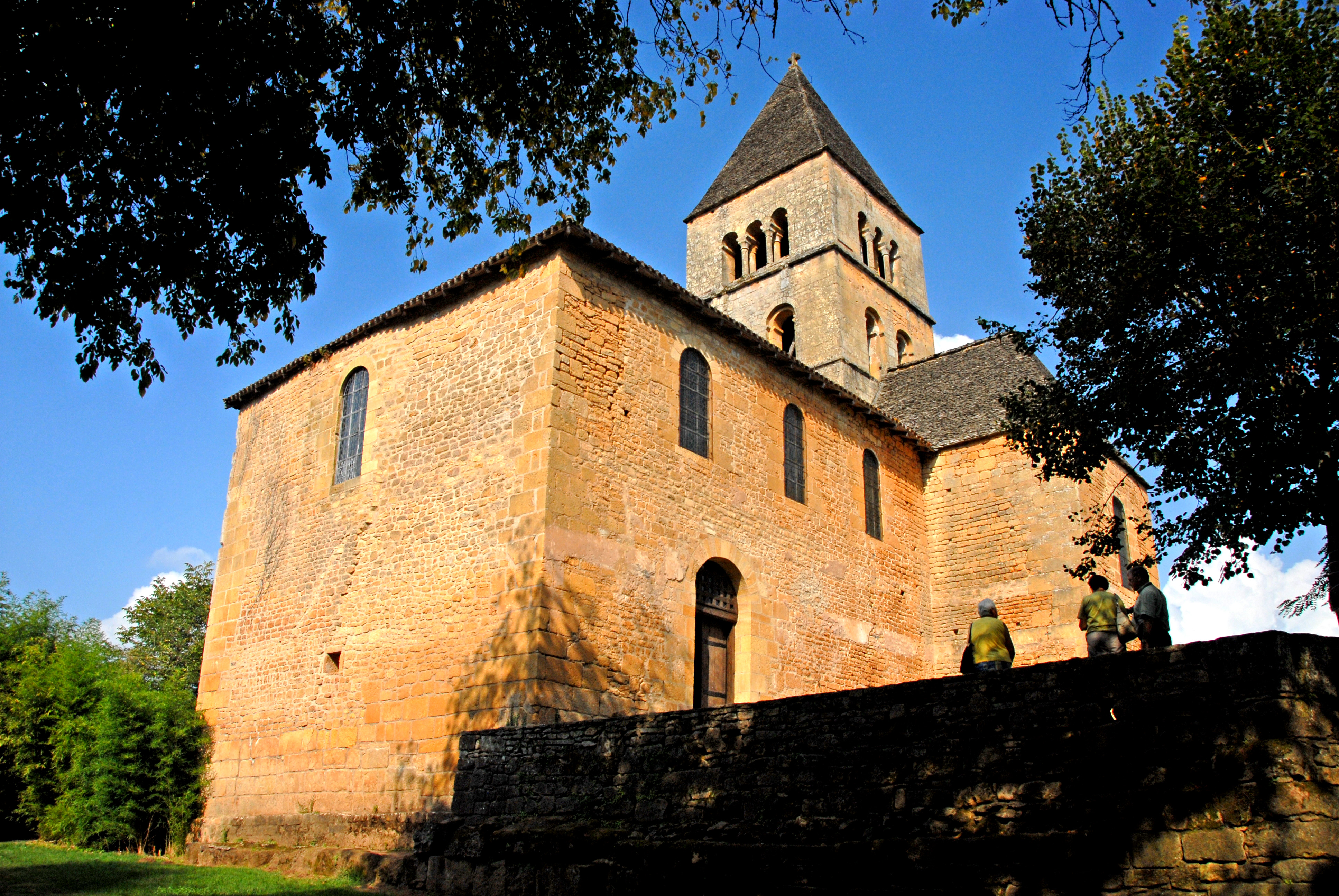 Saint-Léon-sur-Vésère, Schiff 10.Jh., von S-W